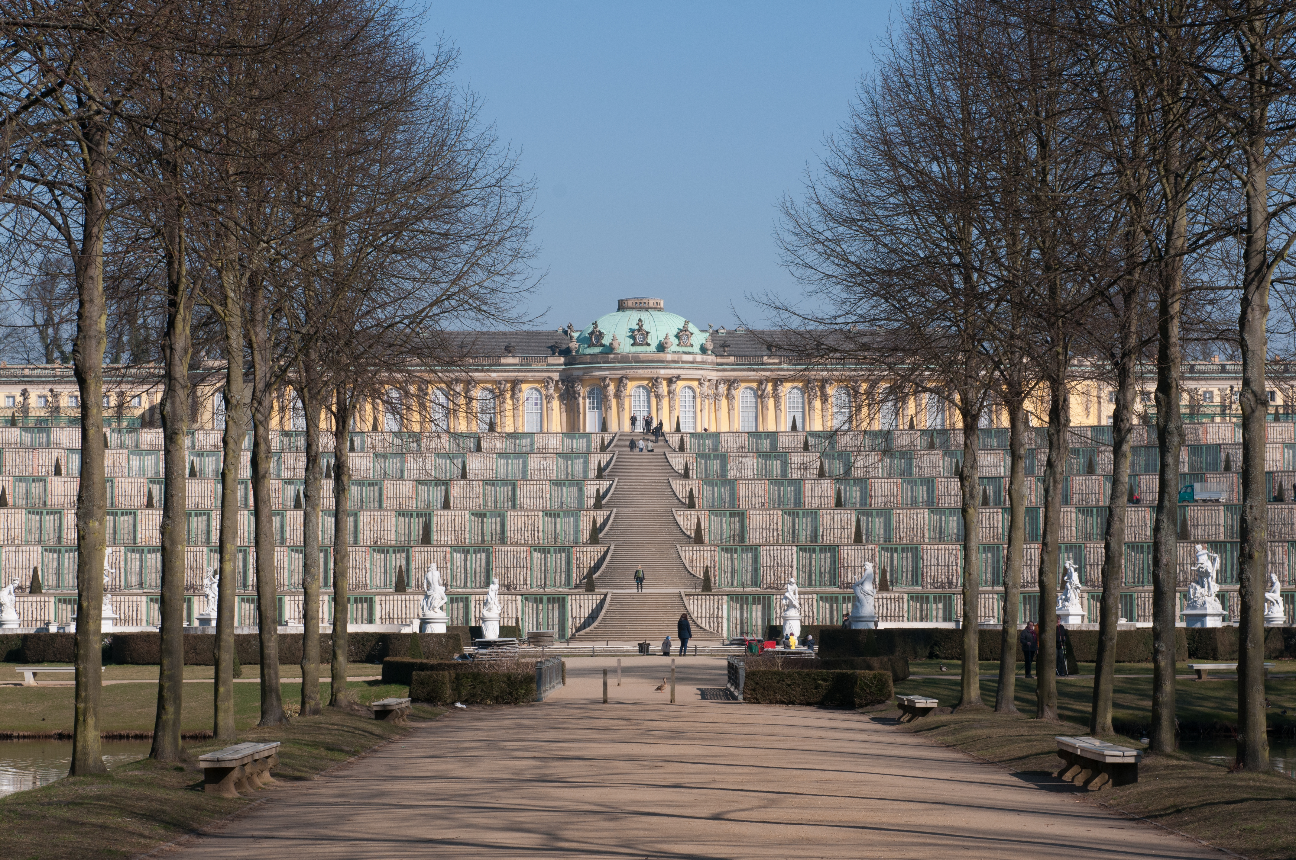 Garten und Schloss Sanssouci V ZR 14/12